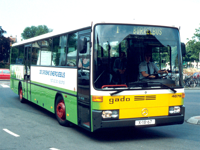 GADO bus 4678 reed oorspronkelijk op bio-alcohol van het Mercedes-Benz type O408 tijdens de presentatie te Groningen. Dit was een proef met drie bussen op bio-alcohol samen met drie diesel bussen. Tijdens deze proef reden alle zes bussen ongeveer dezelfde afstand.